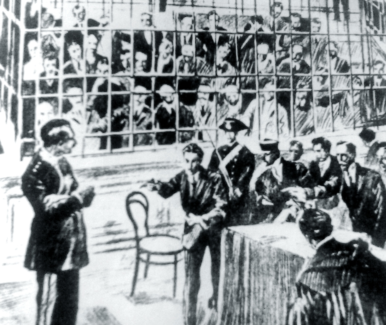 Un'udienza del processo Cuocolo svoltosi a Viterbo nel 1911-12 contro la camorra, disegnata da un giornalista presente in aula.